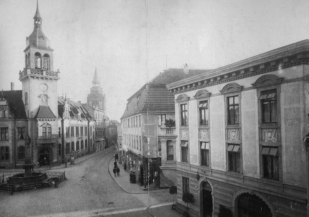 Historisches Foto von Güstrow. Pferdemarkt.